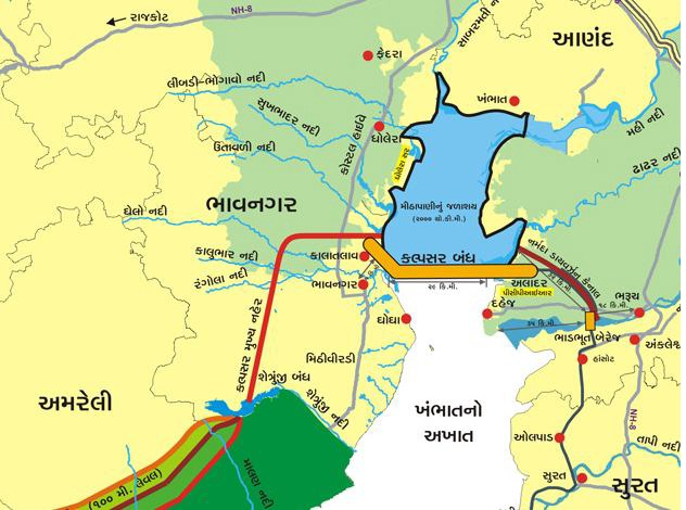 ગુજરાતી: સૂચિત કલ્પસર યોજના